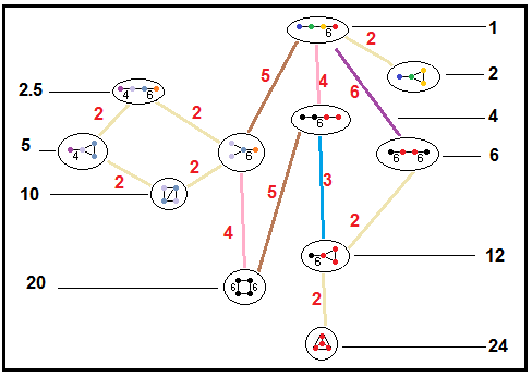 Coxeter-Dynkin diagram element